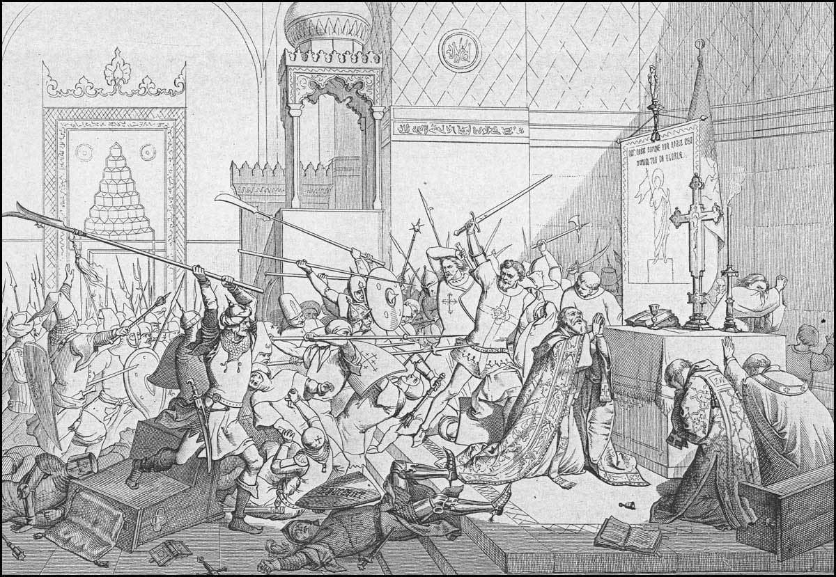 "Nella continua guerra che oppose i Turchi ai Veneziani l’episodio di Smirne acquista un suo valore poiché giunge al culmine del conflitto e dopo numerosi successi della Repubblica. Una mossa sbagliata, cioè l’allontanamento di contingenti di armati, dette il destro ai Turchi di assalire la città" LA SCHEDA STORICA – 48 STORIA VENETA ESPRESSA IN 150 TAVOLE INVENTATE E DISEGNATE SULLA SCORTA DELLE CRONACHE E DELLE STORIE E SECONDO I VARI COSTUMI DEL TEMPO INCISE DA ANTONIO VIVIANI E DAI MIGLIORI ARTISTI VENEZIANI ED ILLUSTRATA DA FRANCESCO ZANOTTO